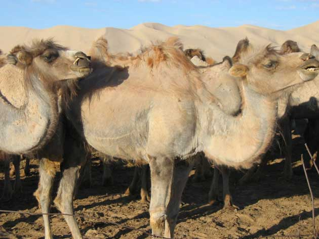 (En): In mongolia (Gobi desert), an animal named camel of Bactrian (Camelus bactrianus) (Fr): En mongolie (Désert de Gobi), un animal nommé le chameau de bactriane (Camelus bactrianus)